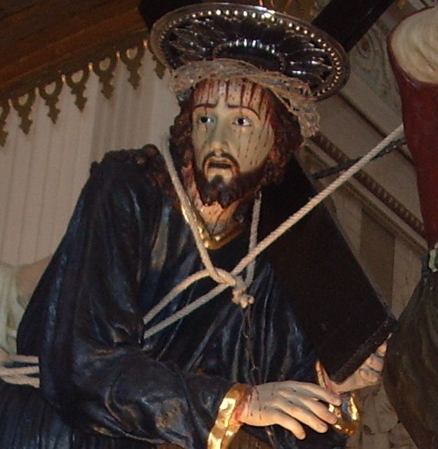 Foto Personale: F.Tumino